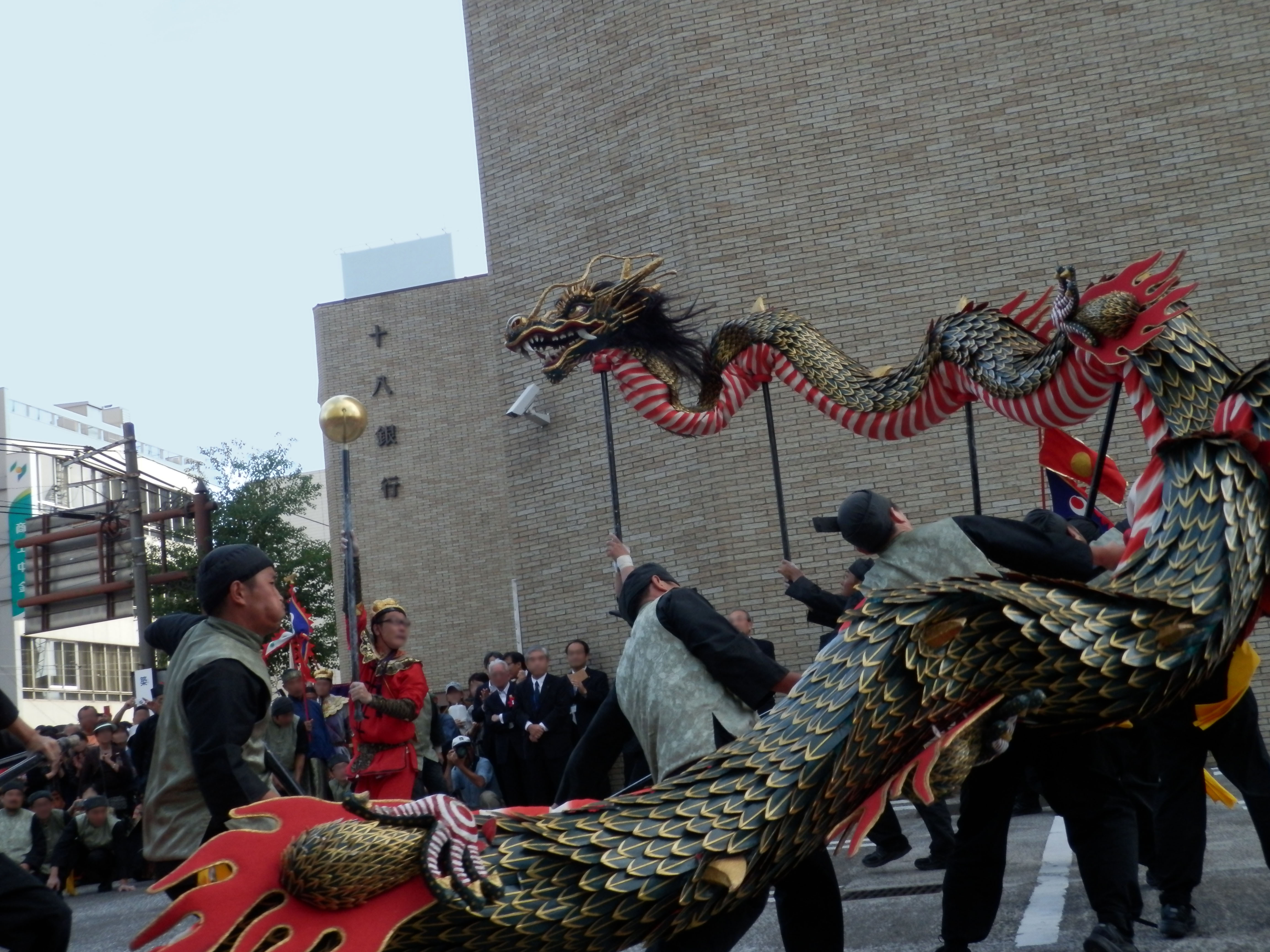 長崎くんちの代表的な演し物である「龍踊り（じゃおどり）」